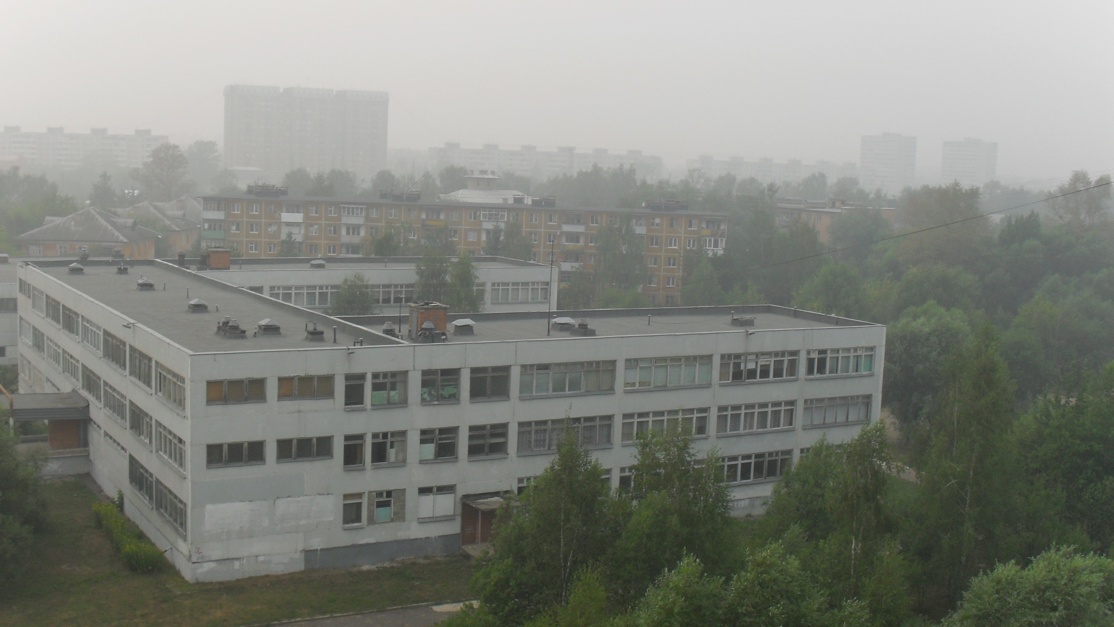 Смог над Серпуховом, 2010